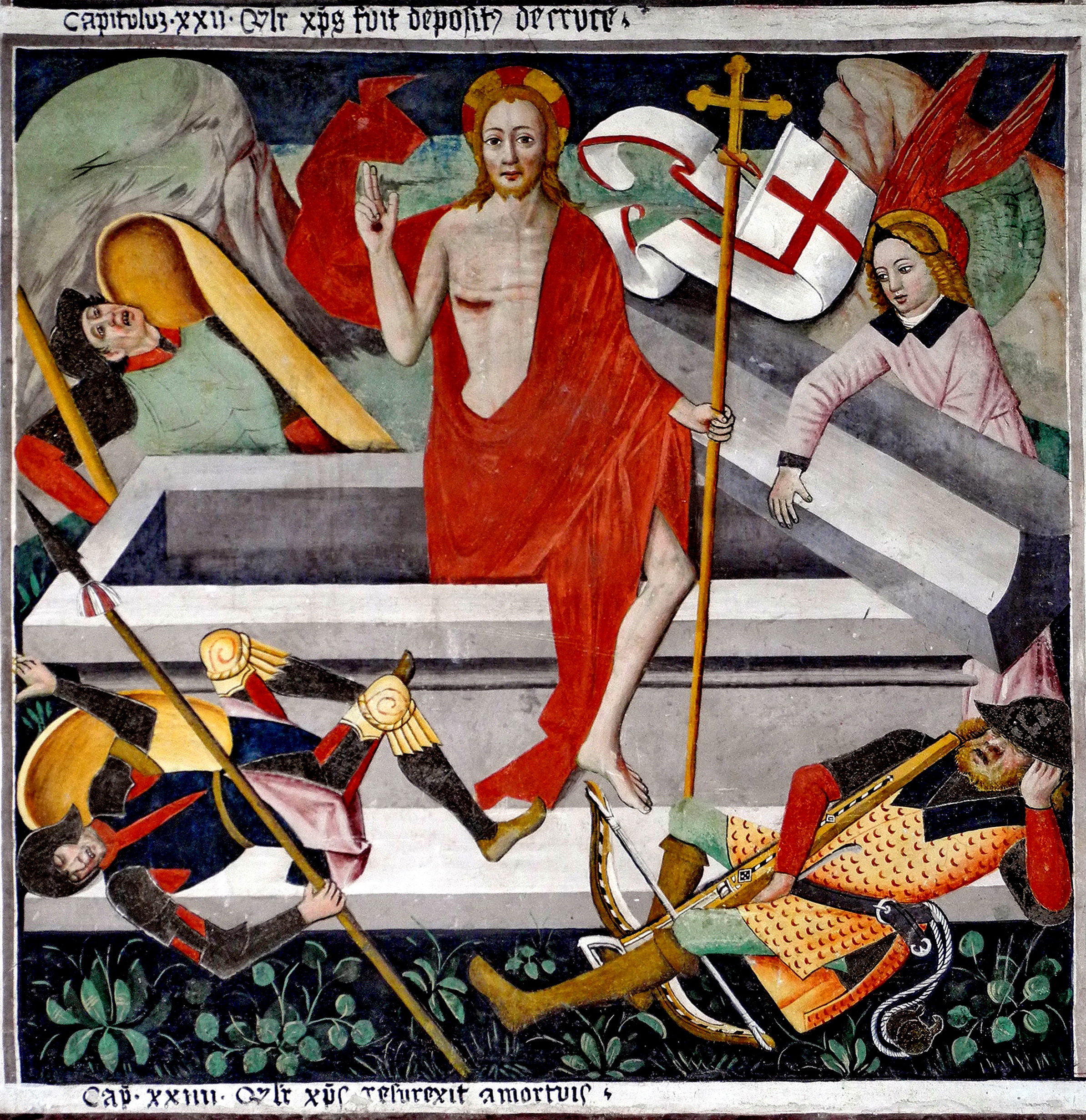 la résurection par Giovanni Canavesio (1492) - CAPITULUS XXIIII : QUALITER CHRISTUS RESURREXIT A MORTUIS (Comment le Christ ressuscita d'entre les morts)